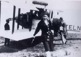 Hyodo Tadashi, première aviatrice japonaise